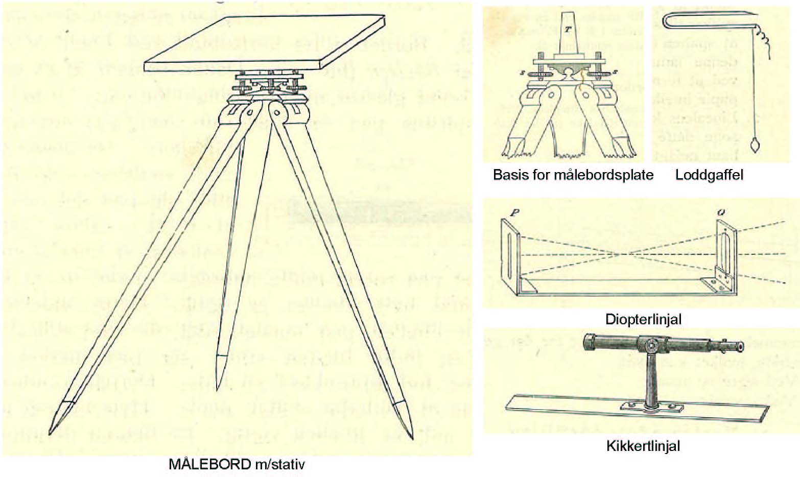 "Målebord" - Old surveying instrument - Details